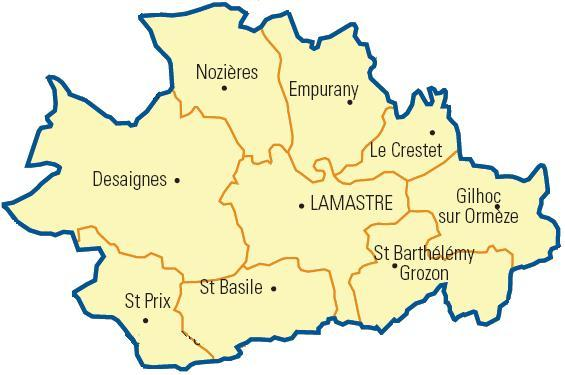 Carte détaillée des communes du canton (Ardèche)